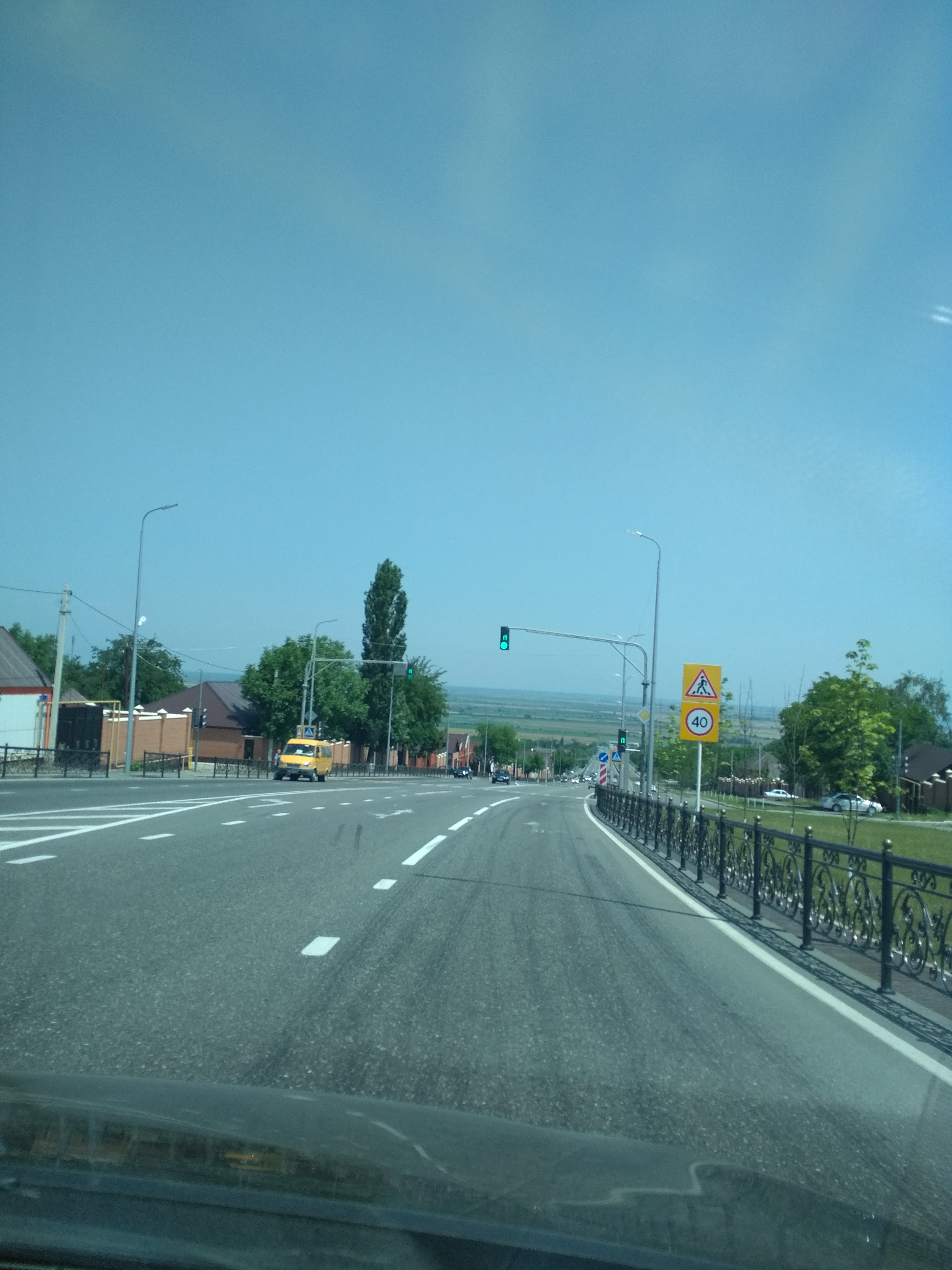 Нохчийн: Ойсхара